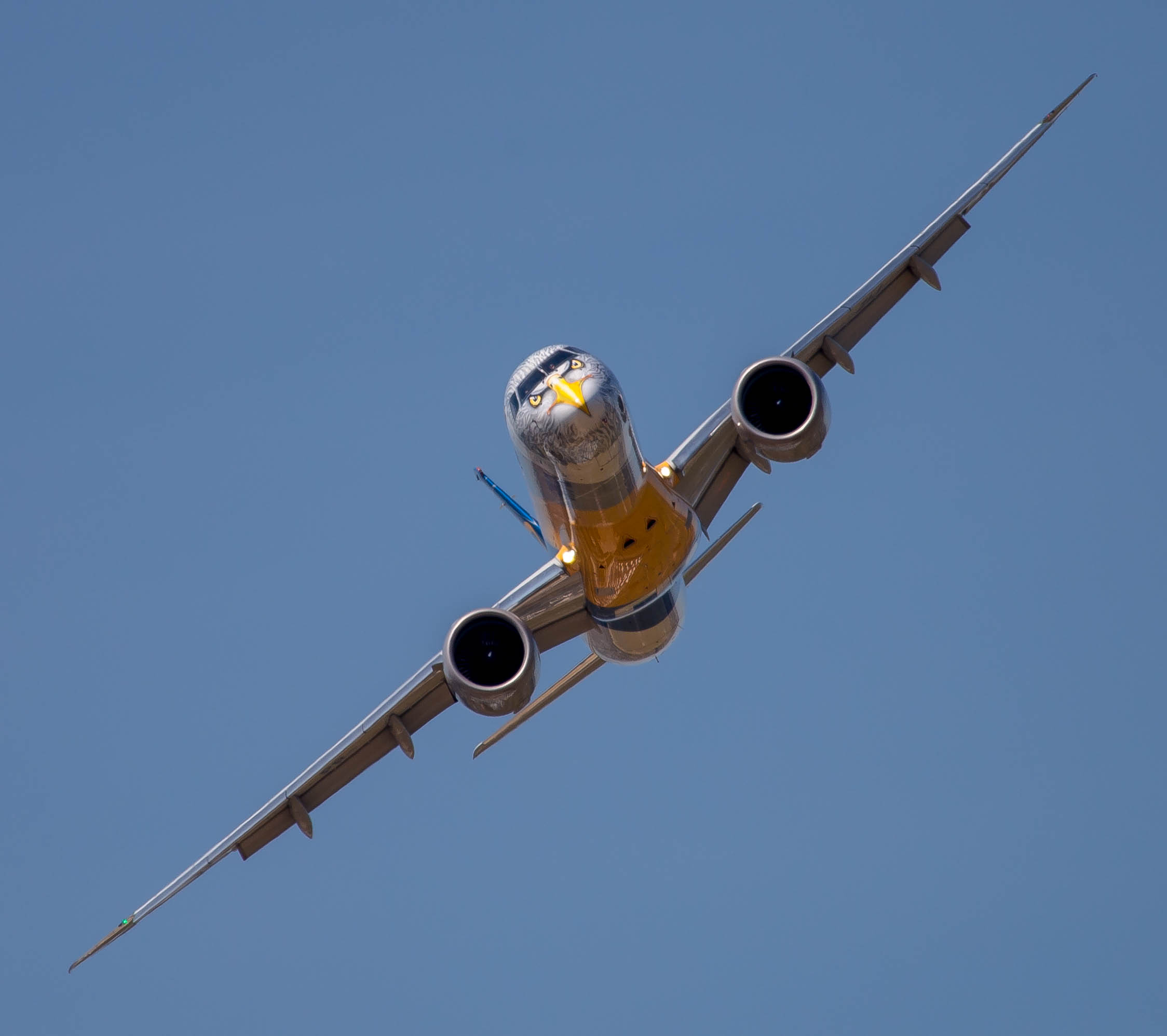 Embraer E195 E2